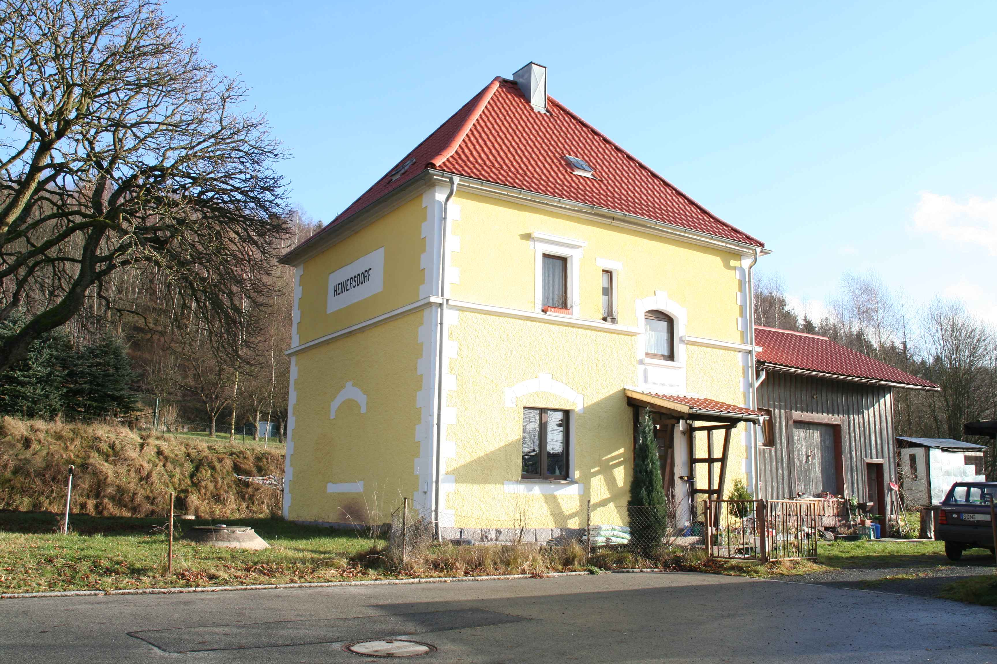 Bahnhof Heinersdorf ehemaliger Bahnhof Heinersdorf im Landkreis Sonneberg